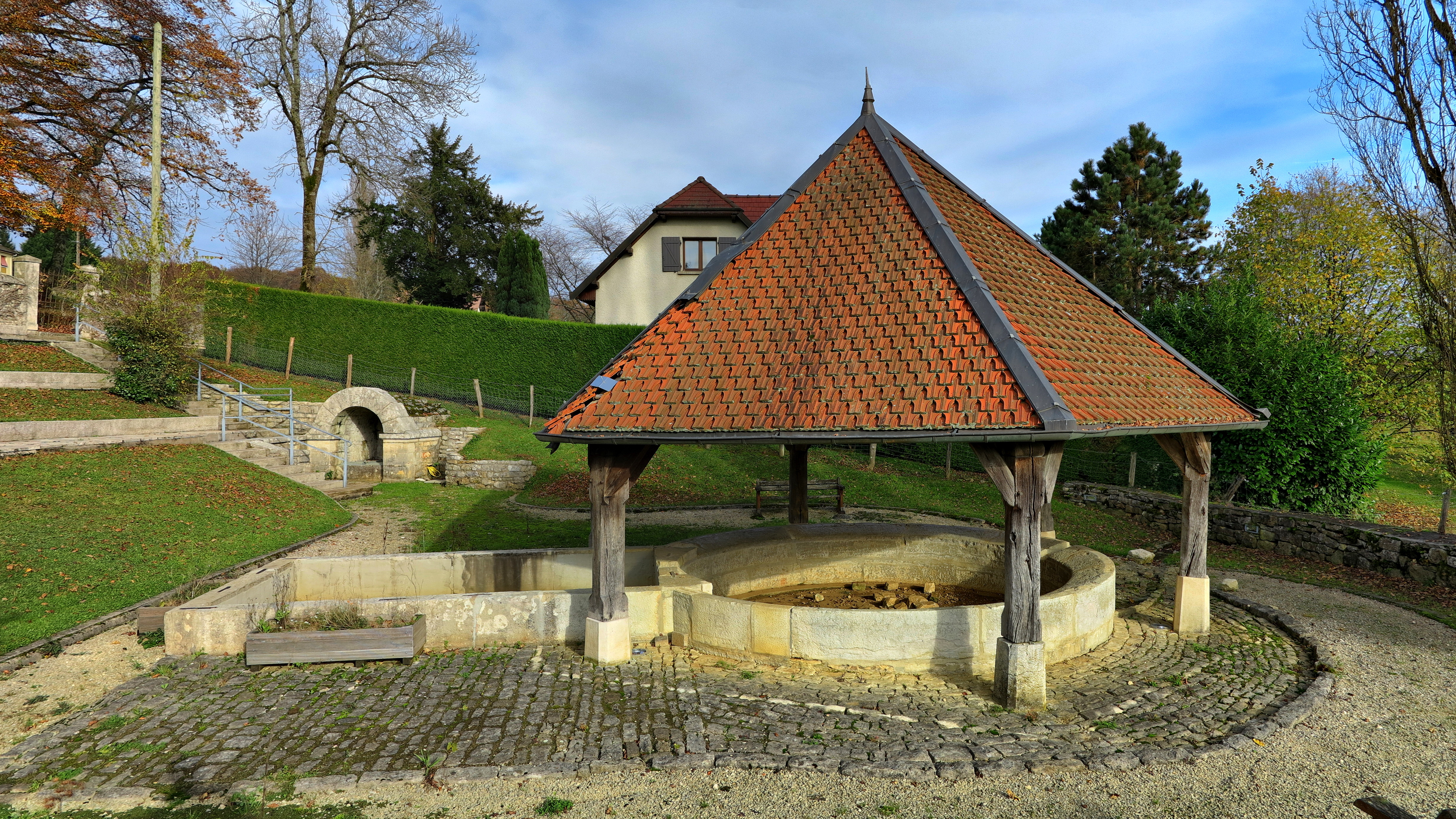 La fontaine et son lavoir rond couvert d'un toit hexagonal